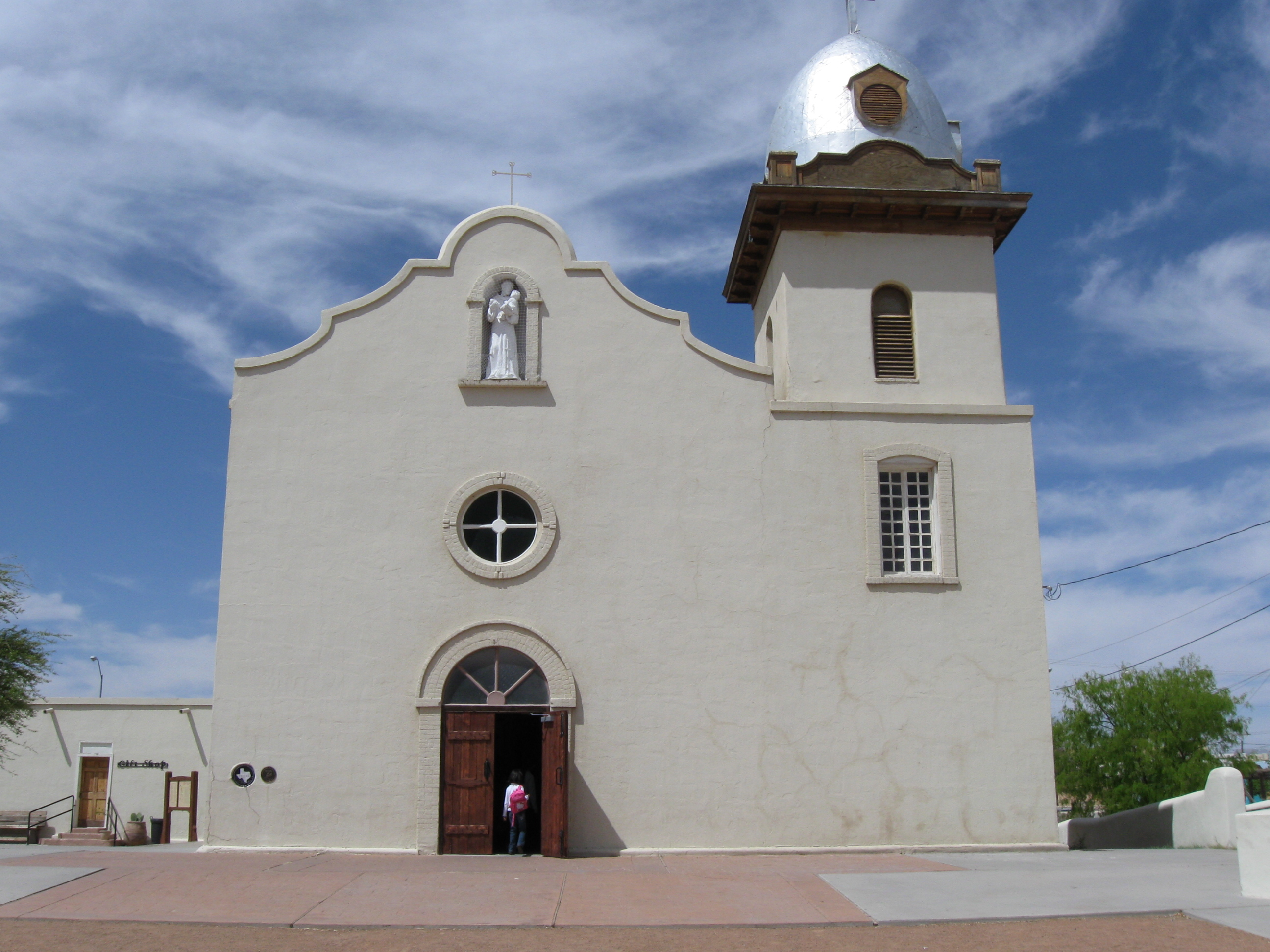 Ysleta Del Sur church, La Mision de Corpus Christi de San Antonio de la Ysleta del Sur. Historic Rio Grande community just south of El Paso